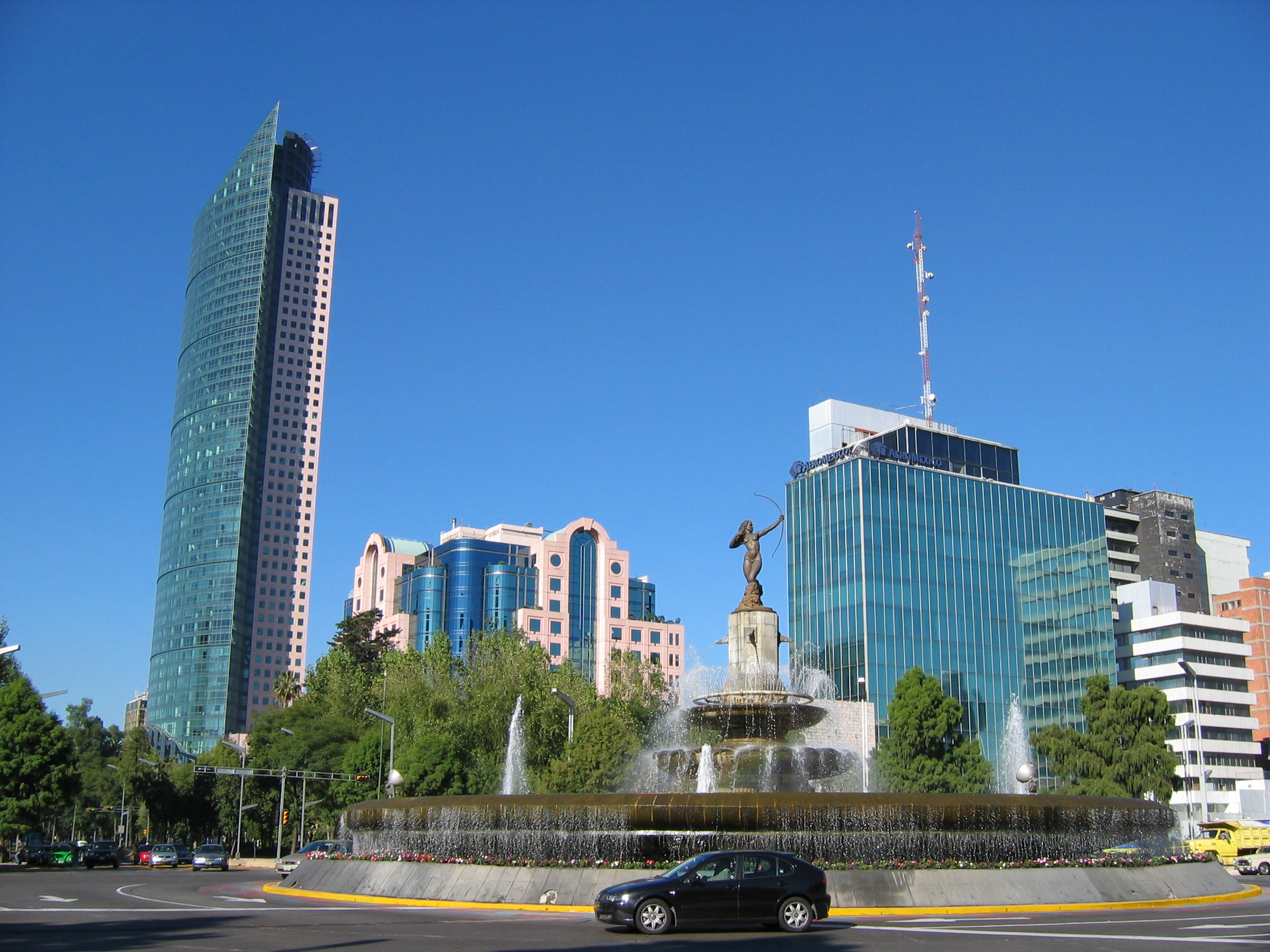 Torre Mayor y Glorieta de La Diana. Ciudad de México